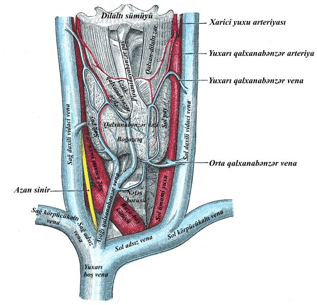 Yuxarı boş vena sistemi